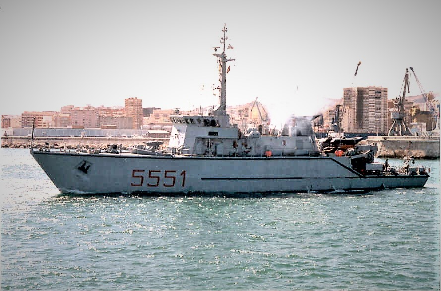 Il cacciamine Sapri